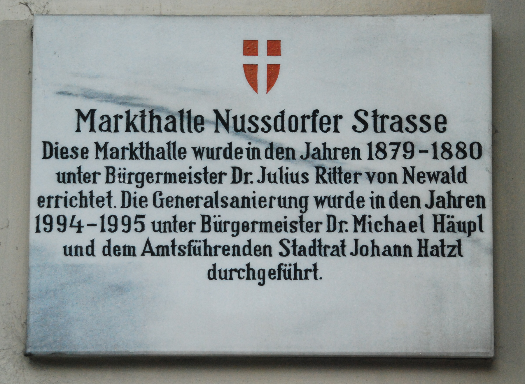 Tafel an der Markthalle Nussdorf in Wien-Alsergrund.